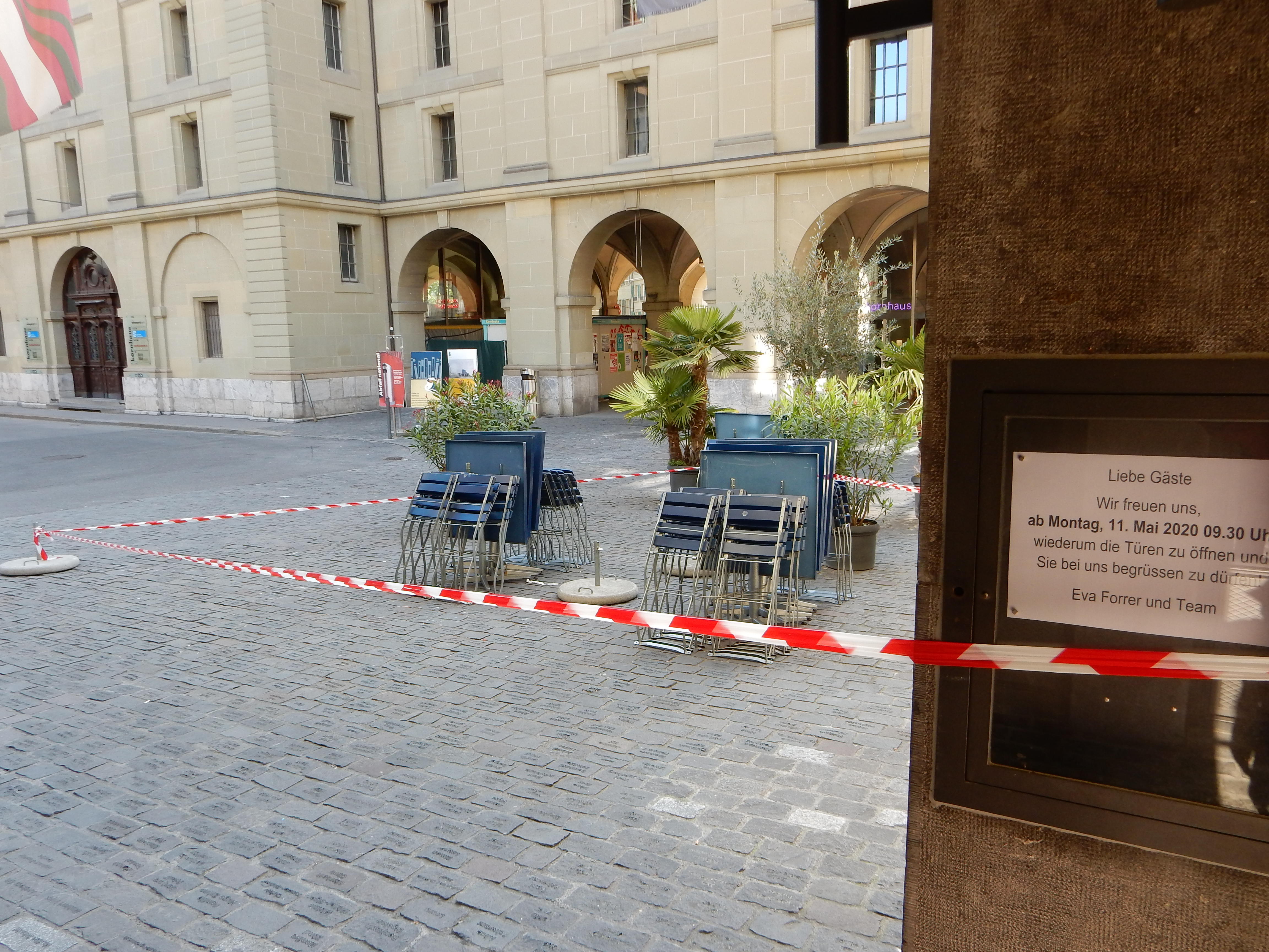 Bern (Schweiz): Covid-19-Verhaltenshinweise im öffentlichen Raum, Restaurant kündigt Wiedereröffnung nach der Zwangsschliessung aller Restaurants an